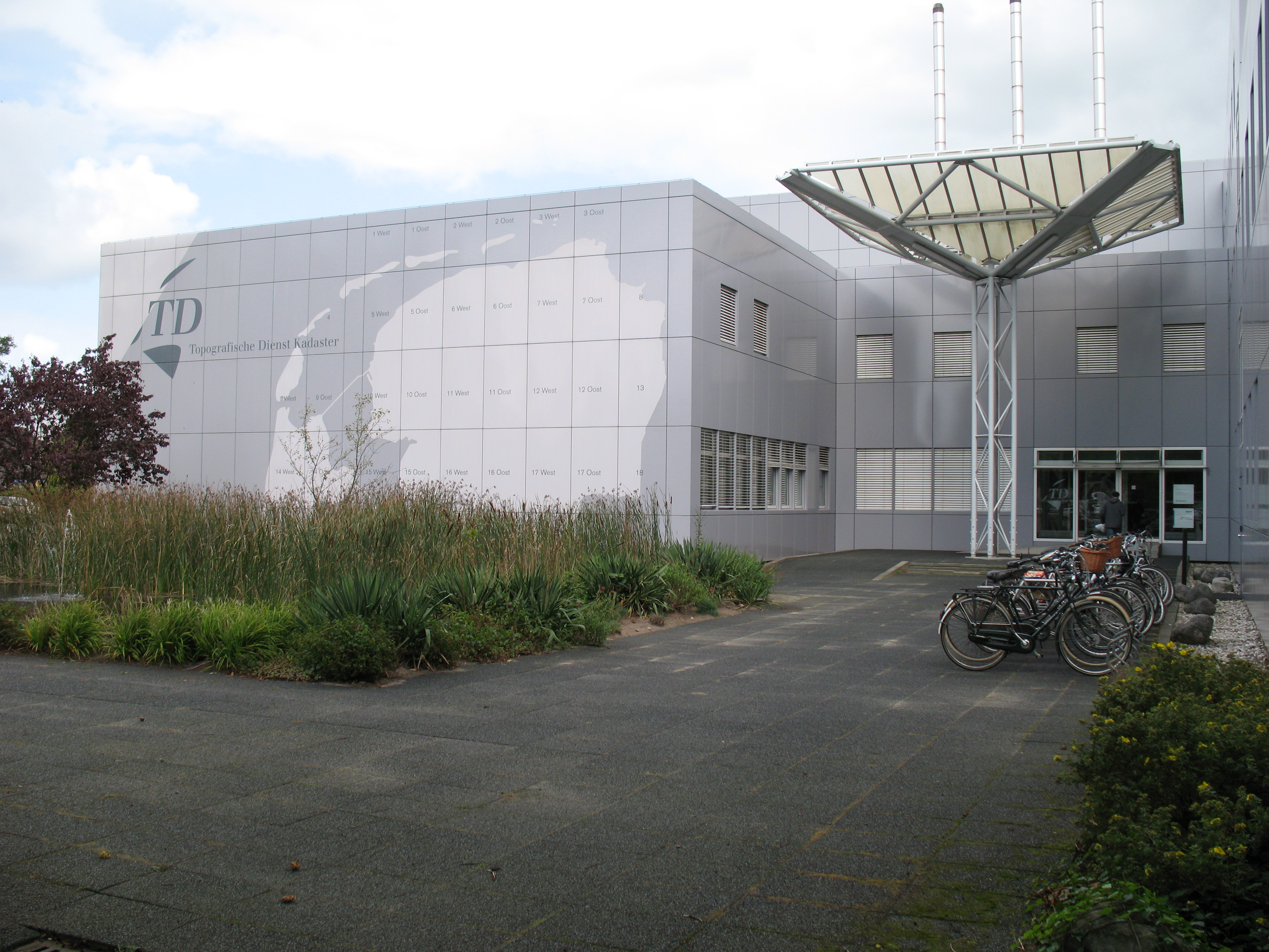 Voorzijde Topografische Dienst Kadaster te Emmen